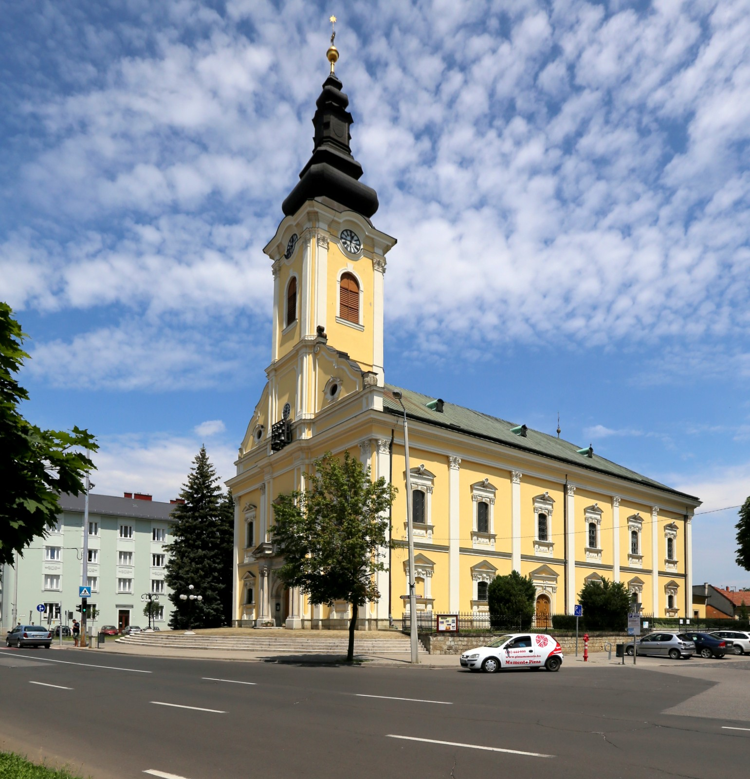 Nyíregyháza, evangélikus templom